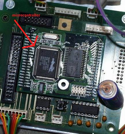 zelf gemaakte foto van me project